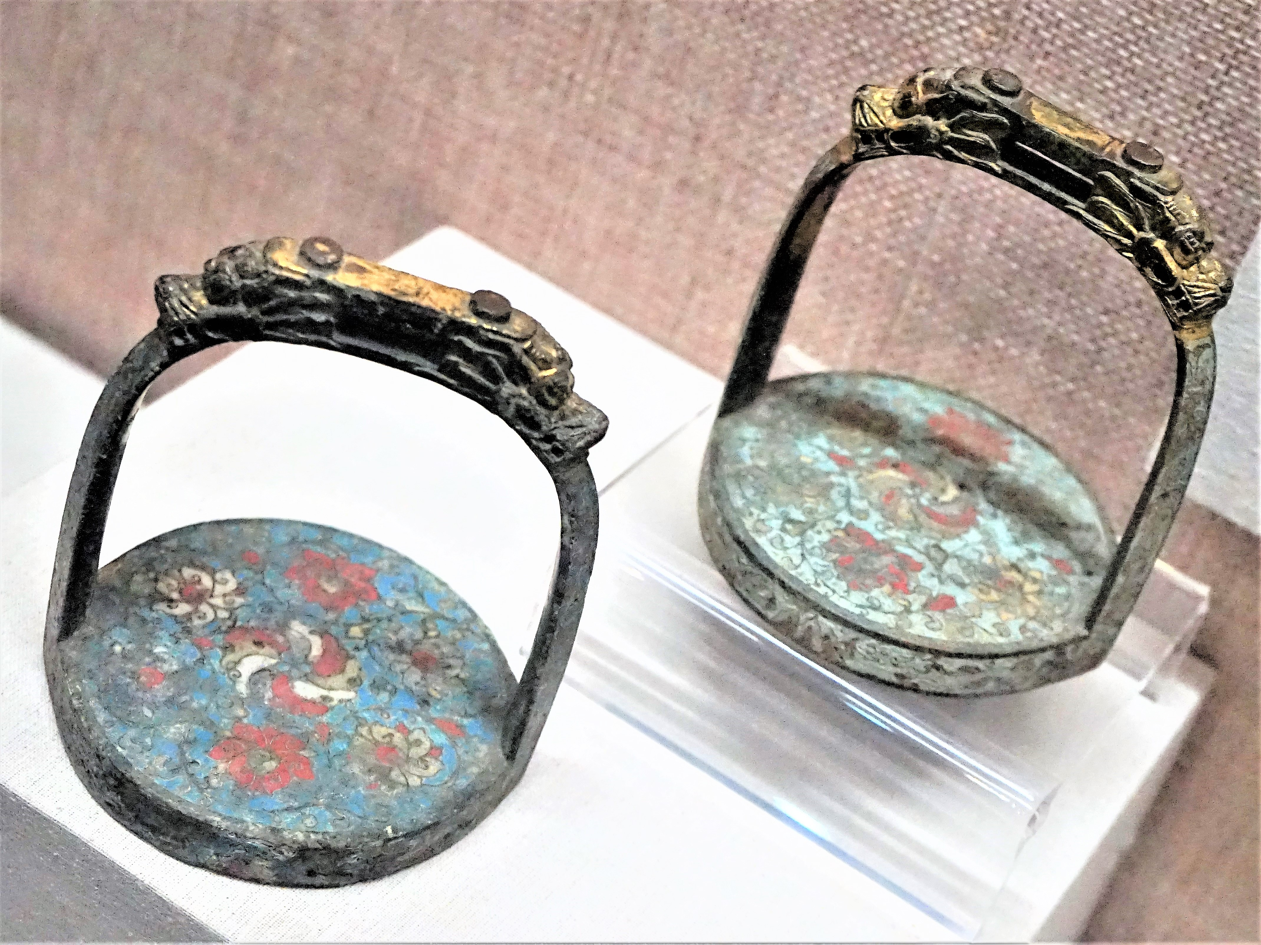 中文（中国大陆）: 清早期珐琅彩鎏金龙头马蹬 清代 梅里斯音钦村出土